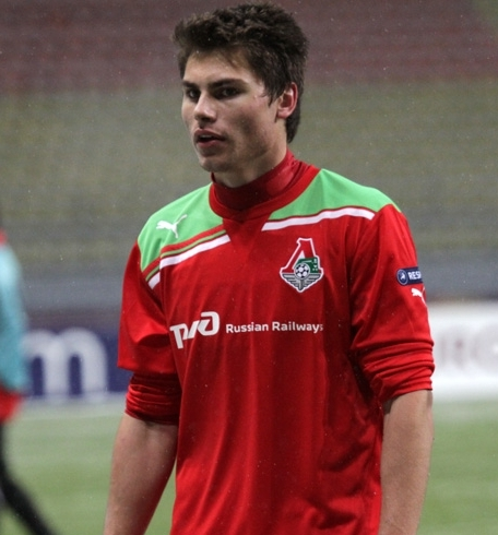 Максим Беляев в составе московского "Локомотива" в матче Лиги Европы.